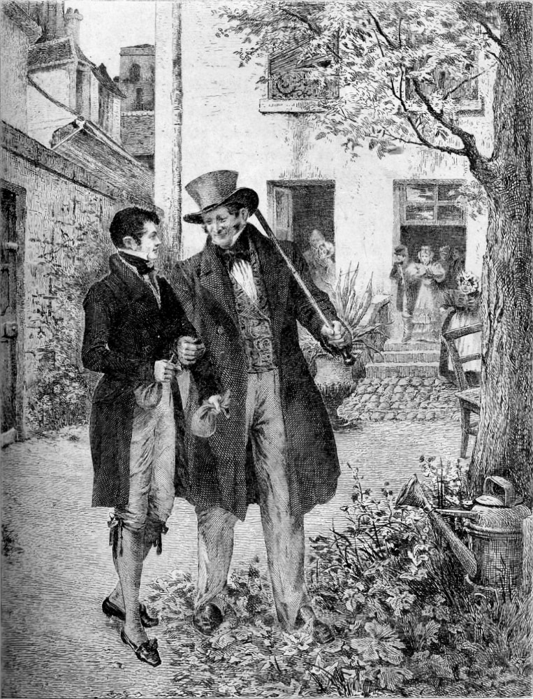 Title page of Honoré de Balzac's Old Goriot (1834).